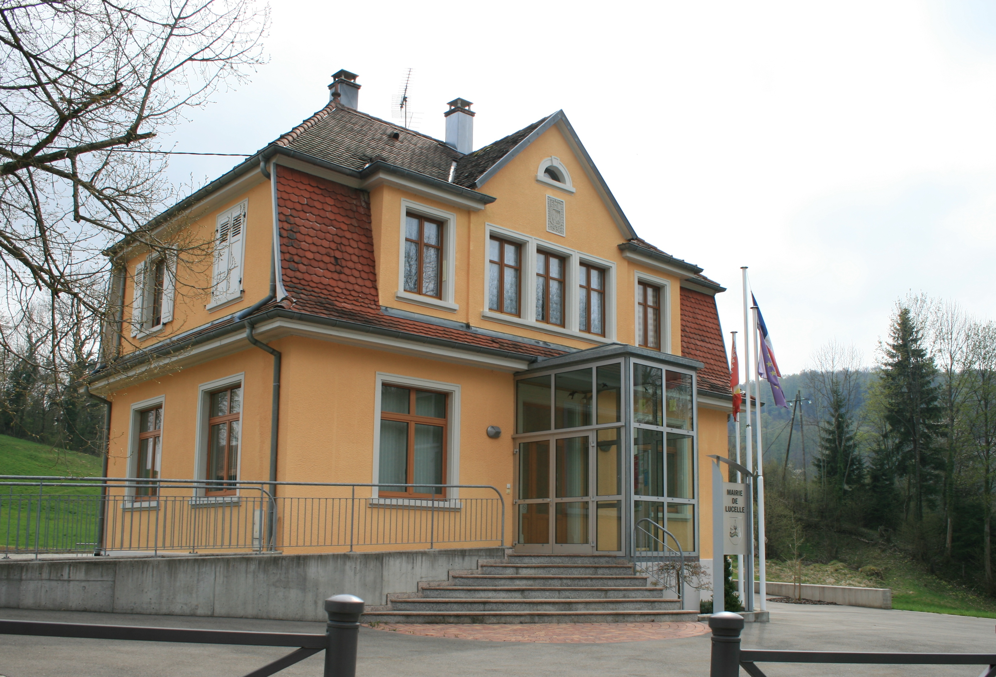 Mairie de Lucelle, Alsace